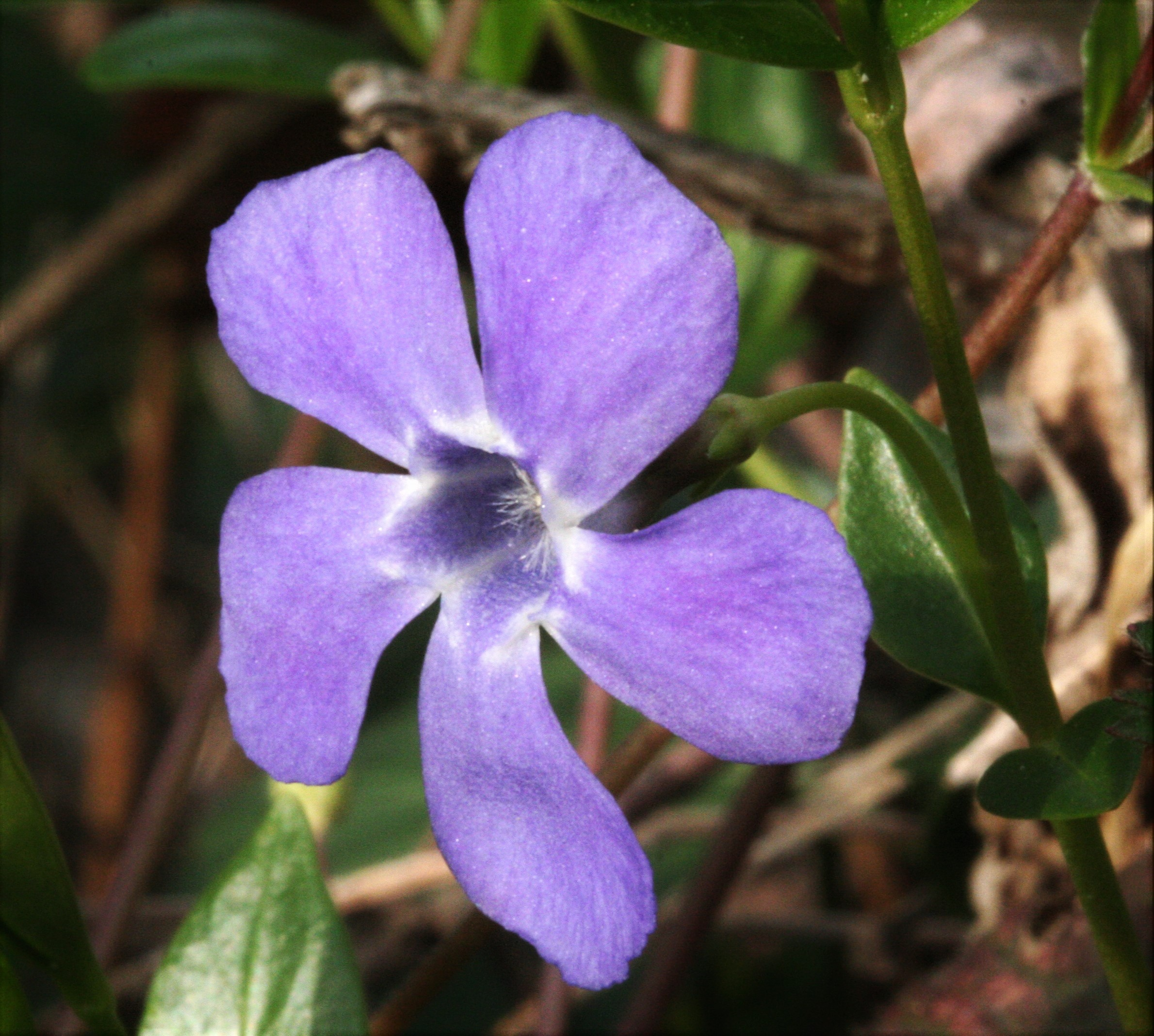 Vinca major - Limana, località Villa di Limana (BL - Italy), 350 m s.l.m. - Marzo 2007